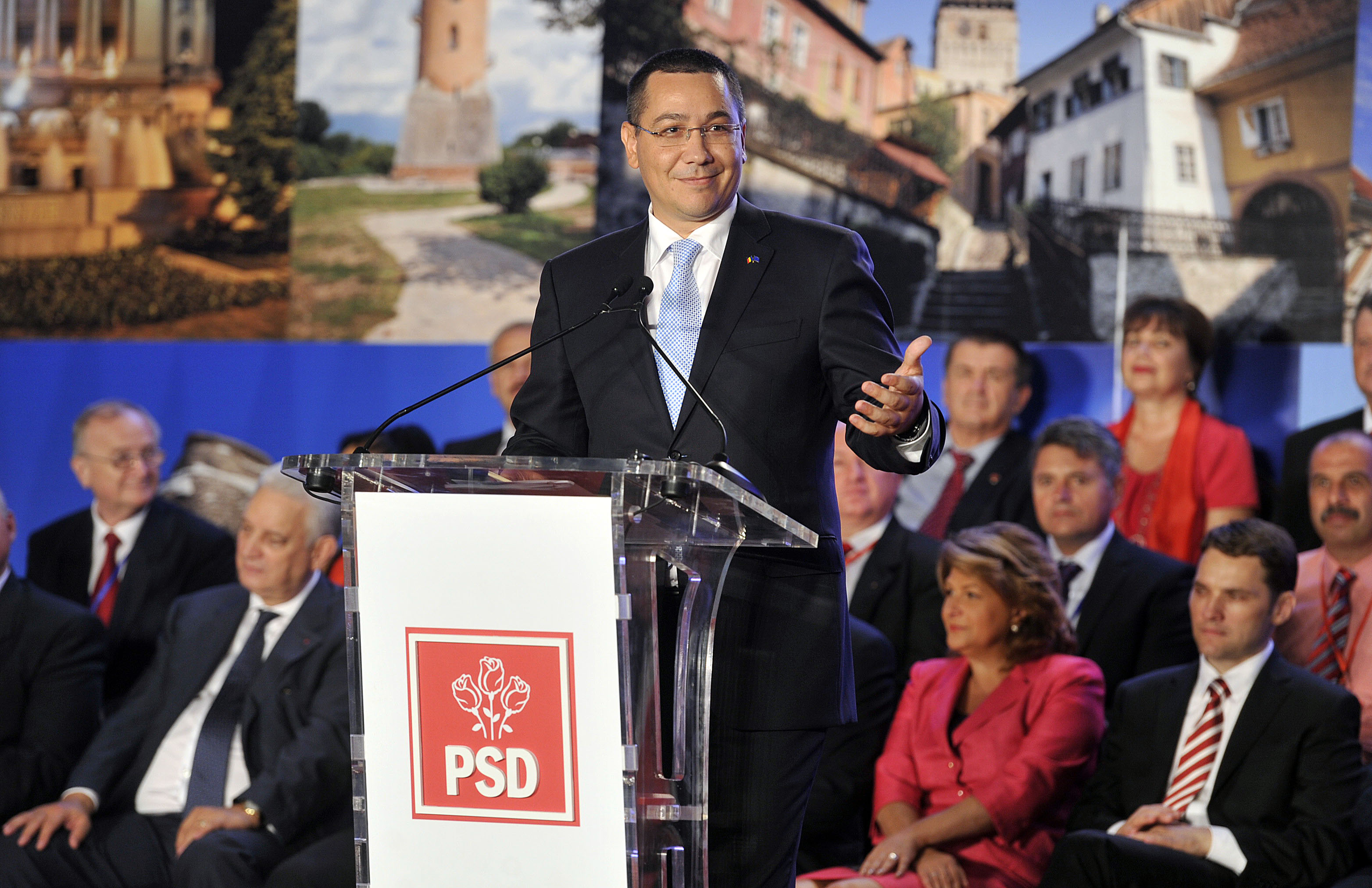 Congresul National al PSD, Alba Iulia - 12.09 (22)